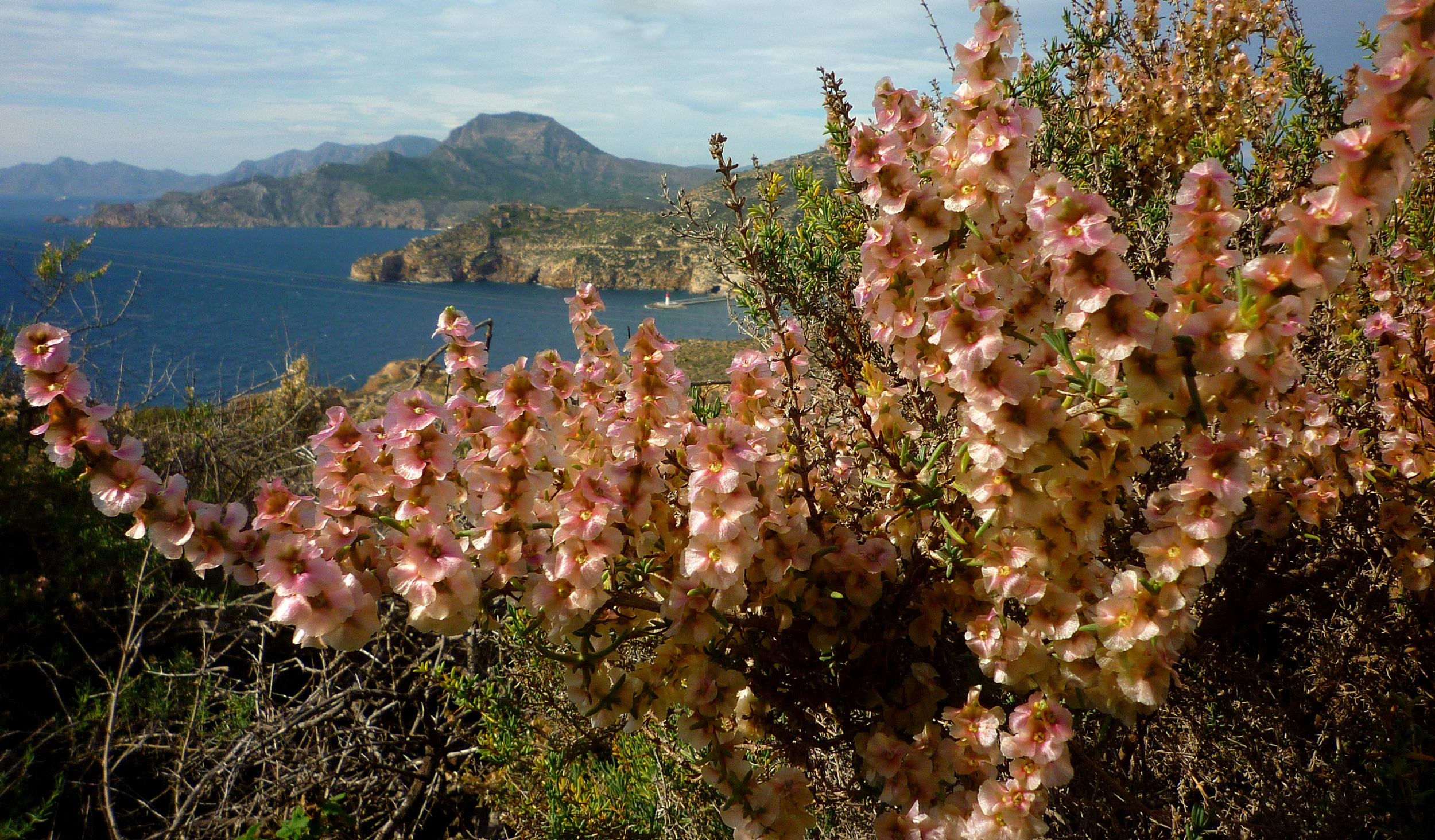 Salsola oppositifolia en noviembre en el Monte San Julián (Cartagena, España)